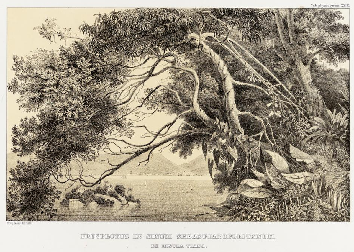 Prospectus in Sinum Sebastianopolitanum ex Insula Viana (vista da baía de Guanabara a partir da Ilha do Viana), em Flora Brasiliensis - Volume I, parte I; gravura de Von Martius a partir de desenho de Benjamin Mary.